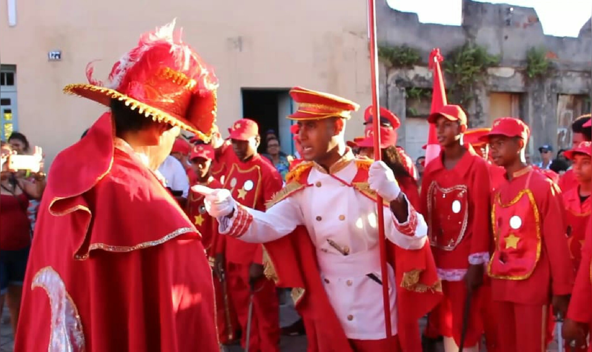 Bbsn bbbbn